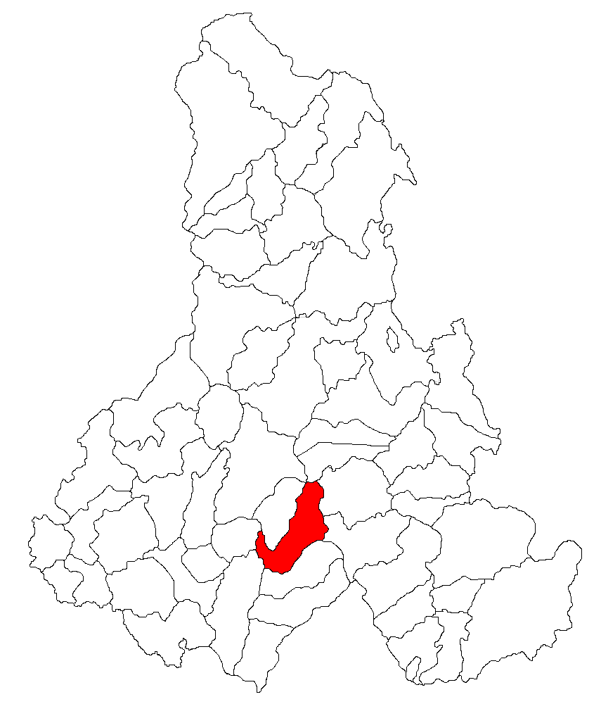 Categorie:Hărţi ale judeţului Harghita Contents 1 Licensing 2 Sursă 3 Licensing 4 Original upload log Licensing Sursă ro::Imagine:Harta_jud_Harghita.png